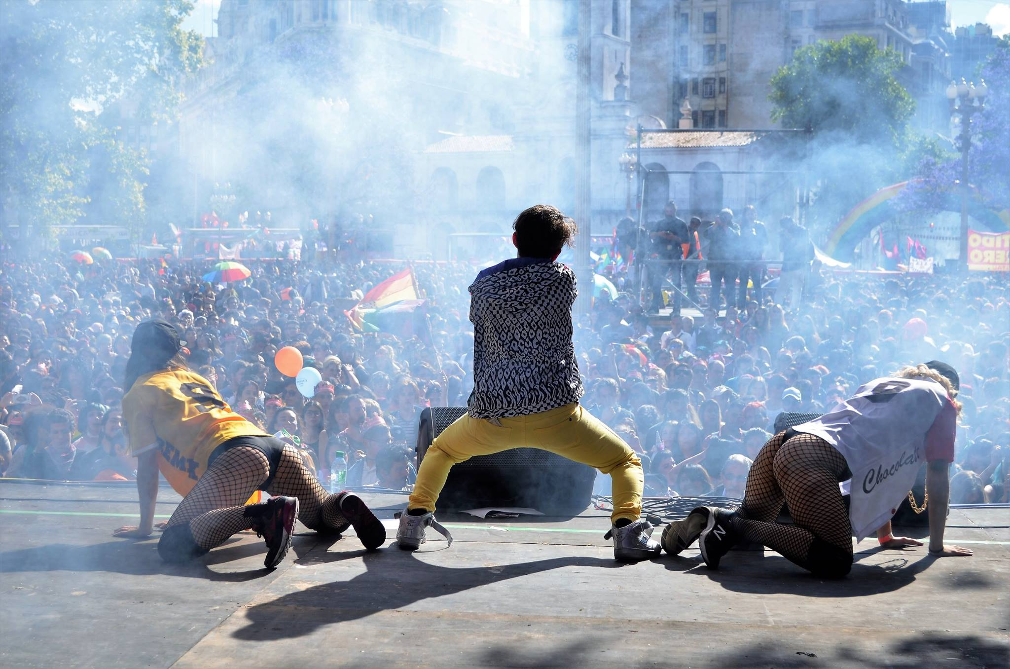 Chocolate Remix em el cierre de la Marcha del Orgullo LGBTIQ 2017 en Buenos Aires, Argentina.